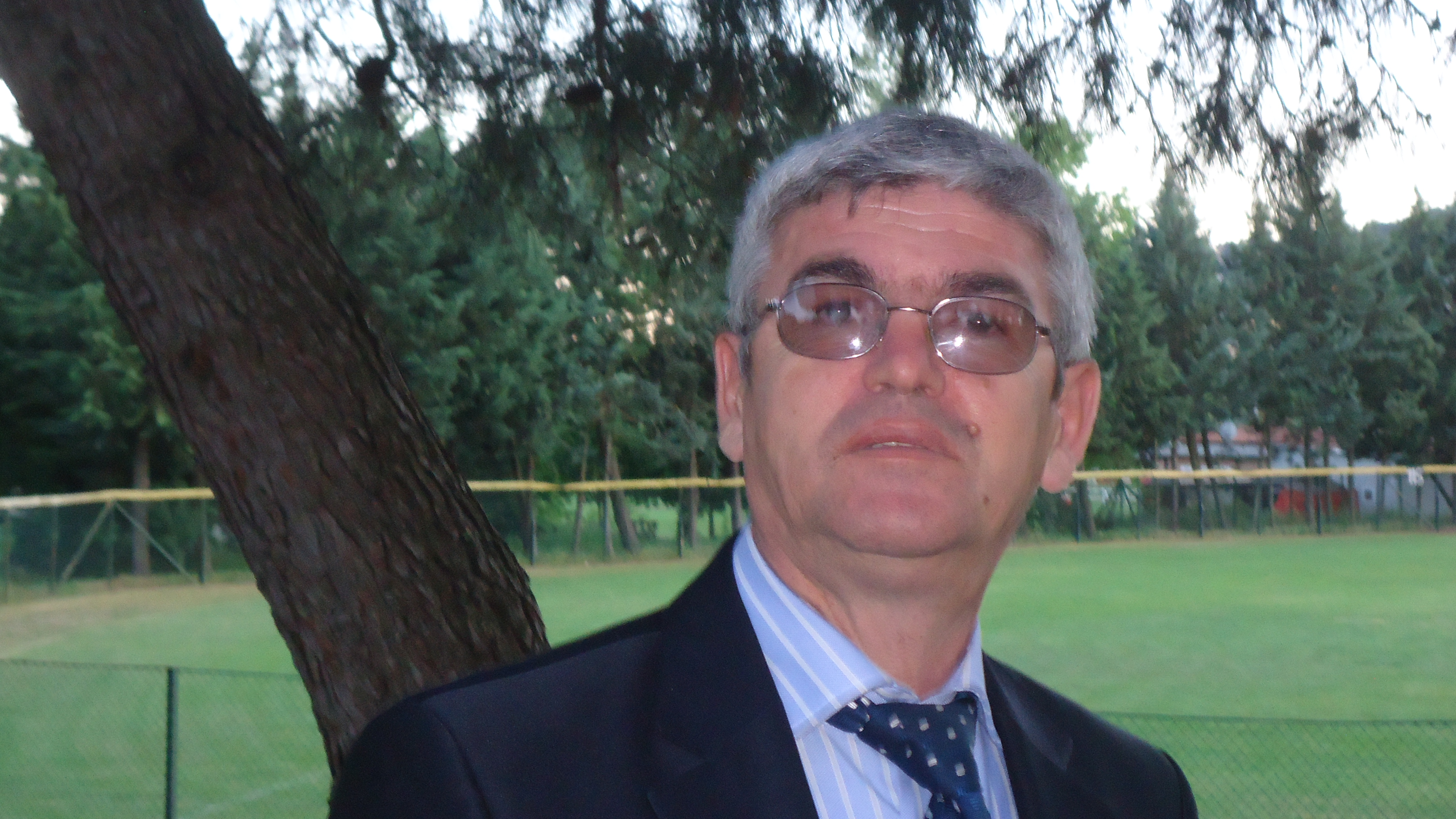 Publiçisti Sakip Cami